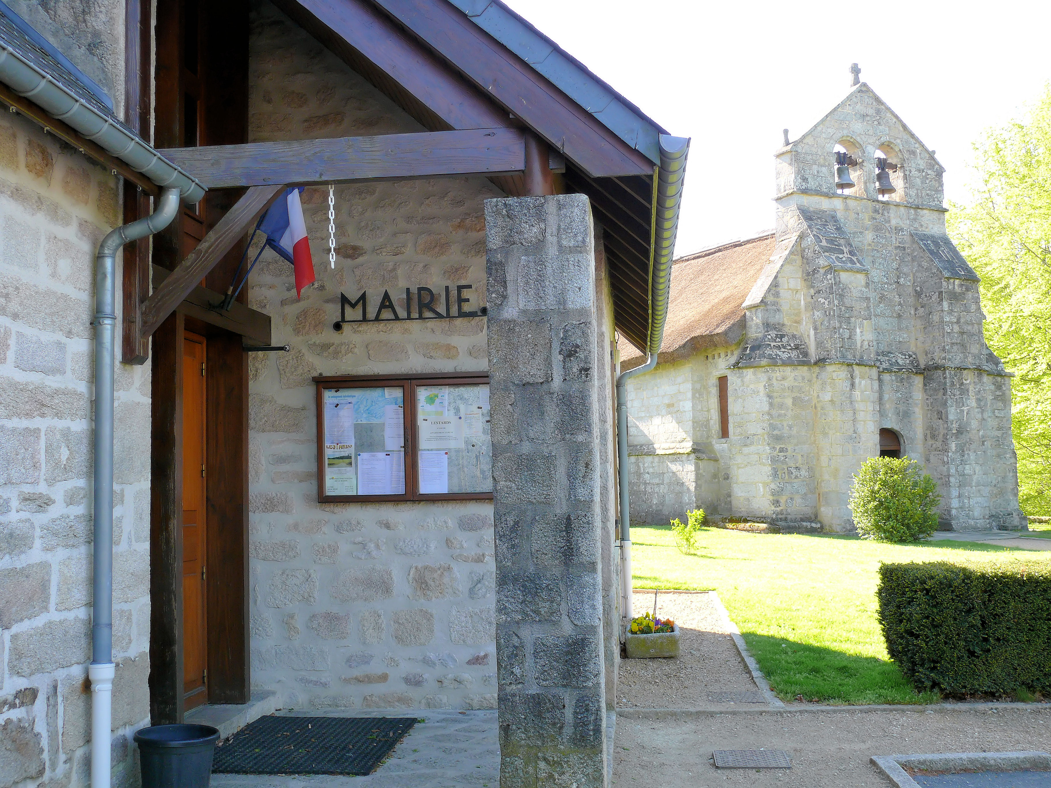 Lestards - La mairie et l'église Saint-Martial